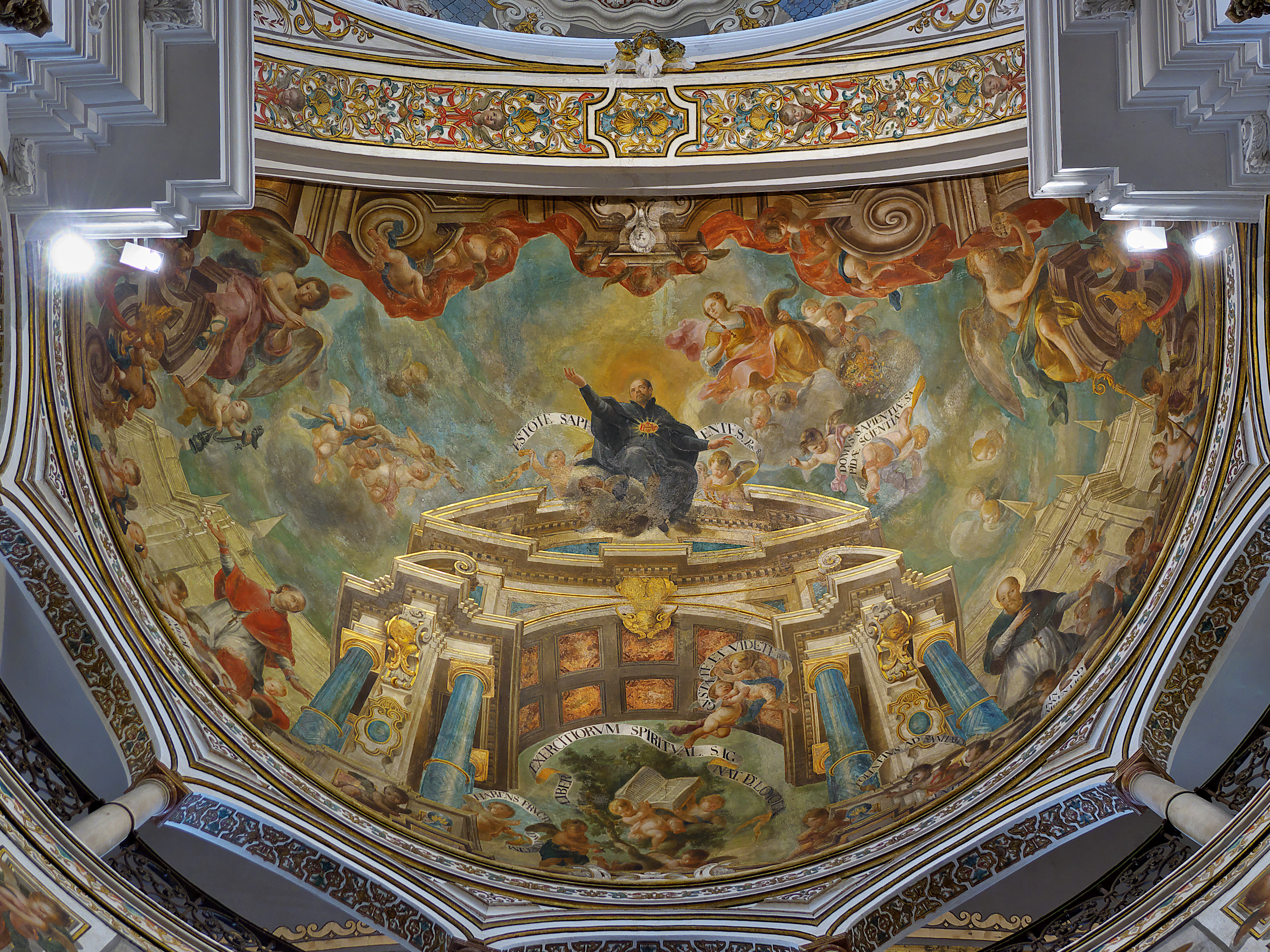 Iglesia de San Luis de los Franceses (Sevilla). Apoteosis de San Ignacio, Domingo Martínez (1743). Domingo Martínez disponía del tratado Perspectiva pictorum et architectorum (1642-1709) de Andrea Pozzo, posiblemente proporcionado por Francisco Tamariz, S.J. uno de los ideólogos del templo. Frescos de la Iglesia de San Ignacio (Roma), Andrea Pozzo Frescos de la Iglesia de San Ignacio (Roma), Andrea Pozzo